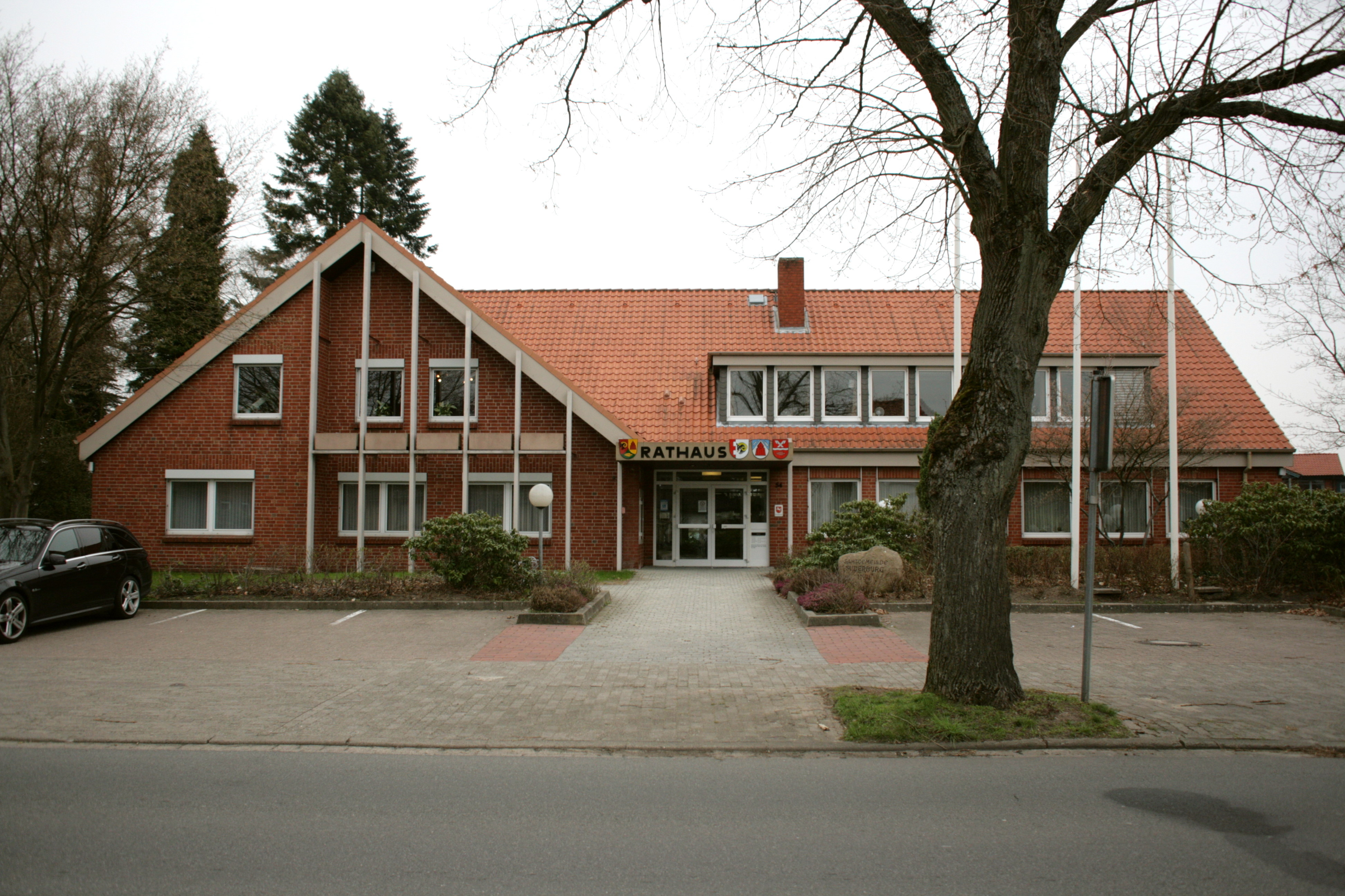 Rathaus Suderburg, Bahnhofstraße 54 in Suderburg